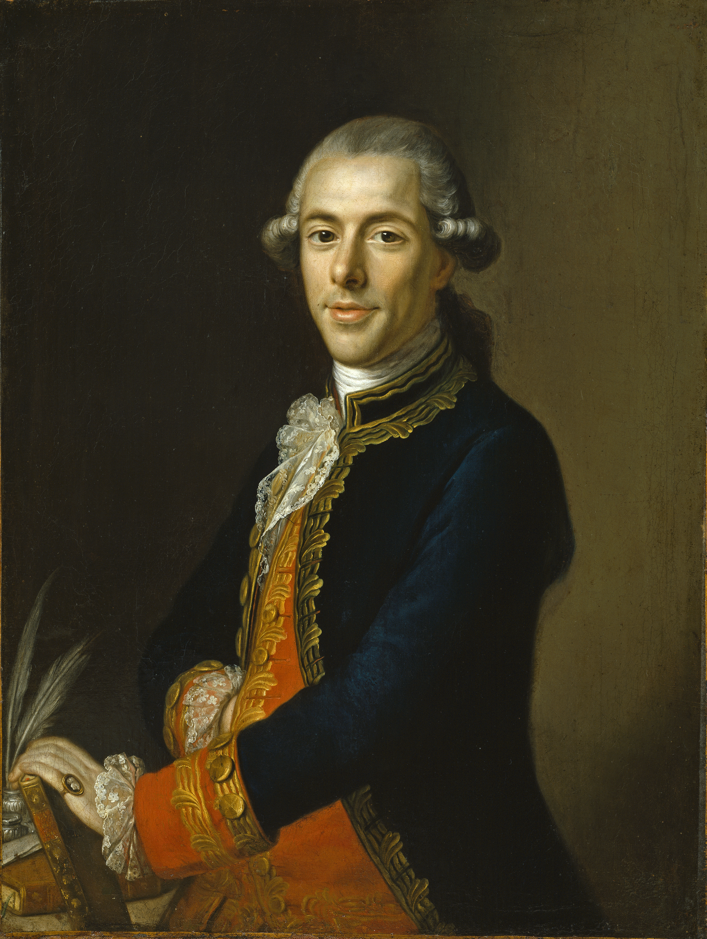 Retrato del escritor e ilustrado español Tomás de Iriarte (1750-1791).